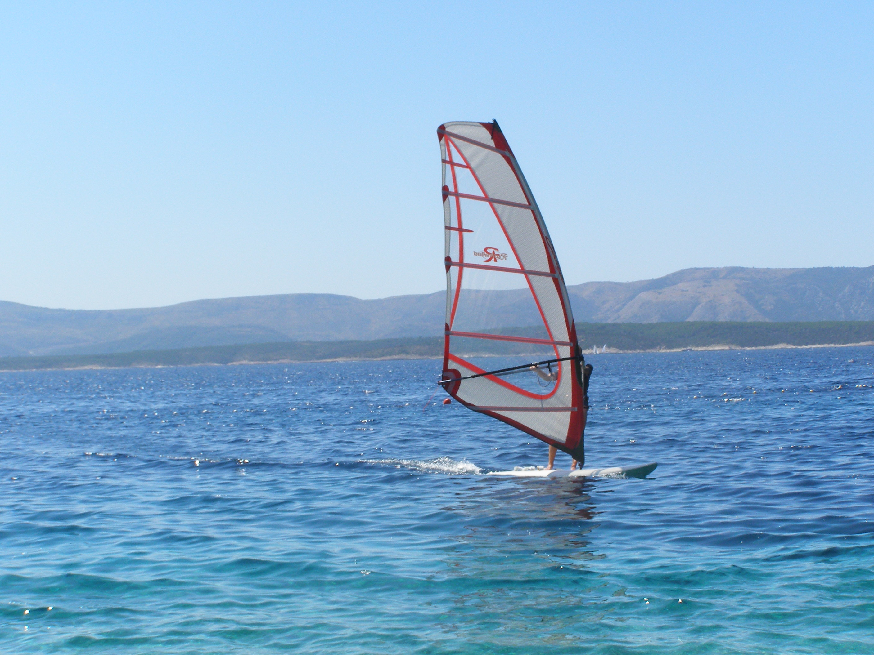 Murvica Surfer, Brac, Croatia